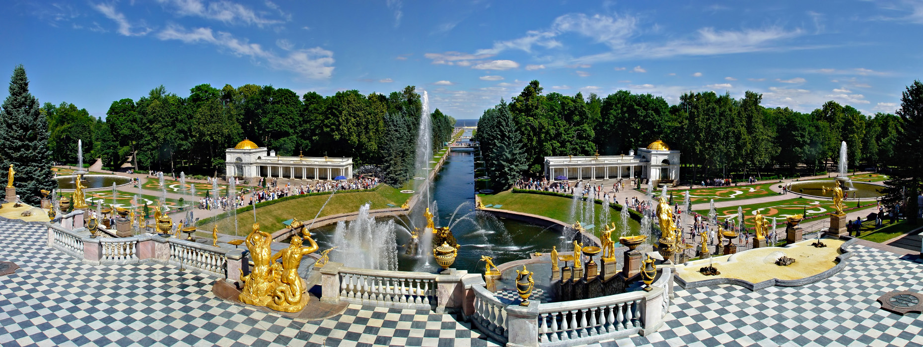 Петергоф, Большой Каскад со стороны дворца